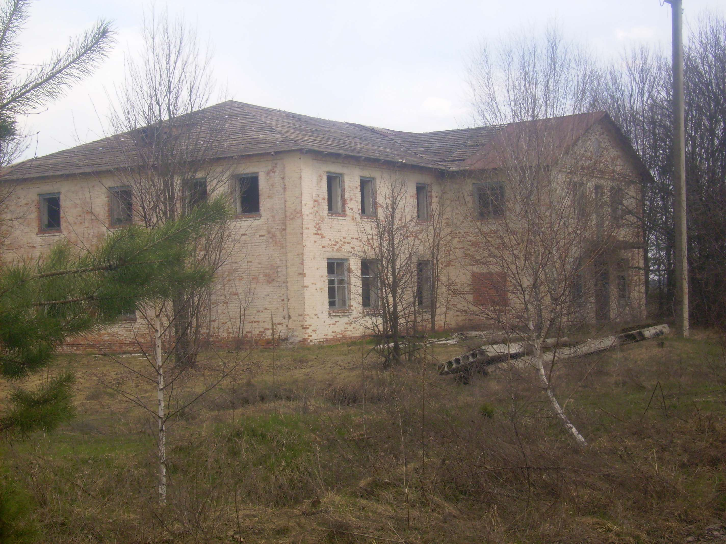 Будівля будинку культури у с. Тараси Поліського р-ну Київської області, Україна